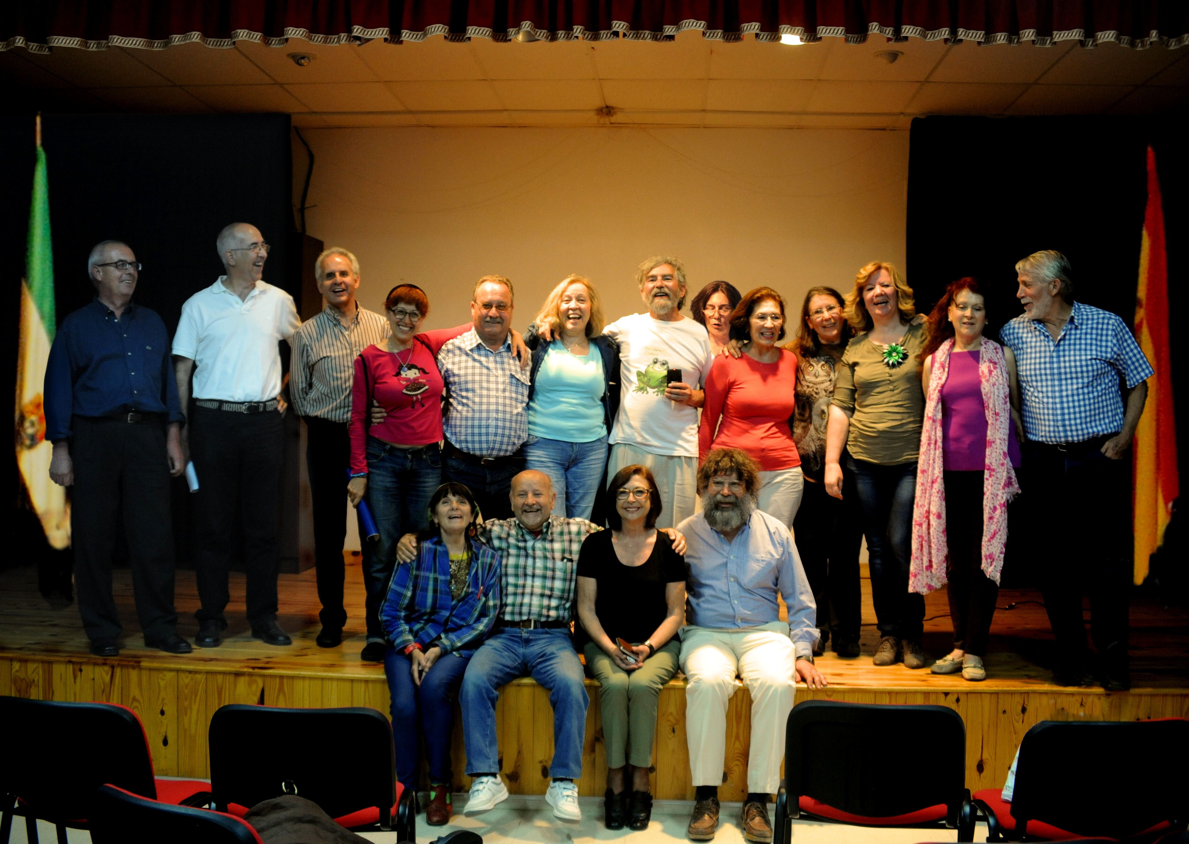 Reunión de escritores extremeños en Ceclavín. 31 de mayo de 2014. De izquierda a derecha: José María Chaparro, Cruz Díaz Marcos, José María Alcón Olivera, Amelia Peco, José Iglesias Benítez, Pepa Rivera, Fran Herrero, Mari José Bustamante, Esperanza Vega, Elisa Herrero, Esperanza González, Rosi Giménez y Santiago Hernández. Sentados: Maribel Alonso, Theo Acedo, Antonia Pons y Miguel Herrero Uceda